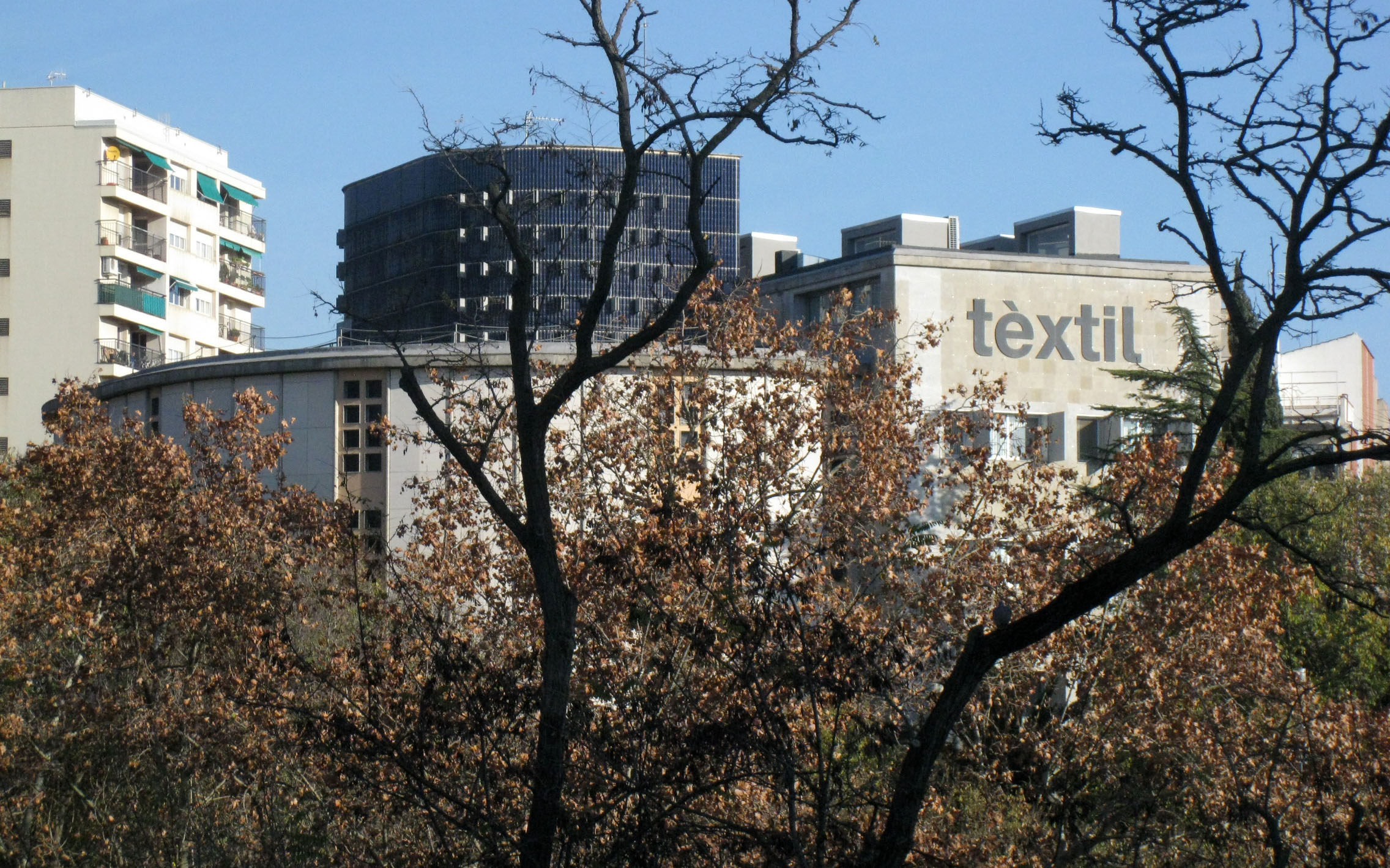 Centre de Documentació i Museu Tèxtil (Terrassa)